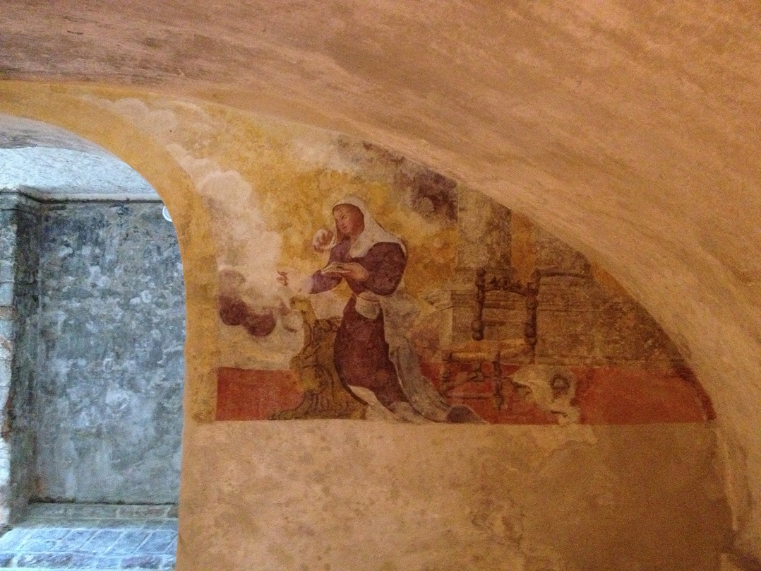 Affresco Maria – Villa Manin Cantarella (Noventa Vicentina)